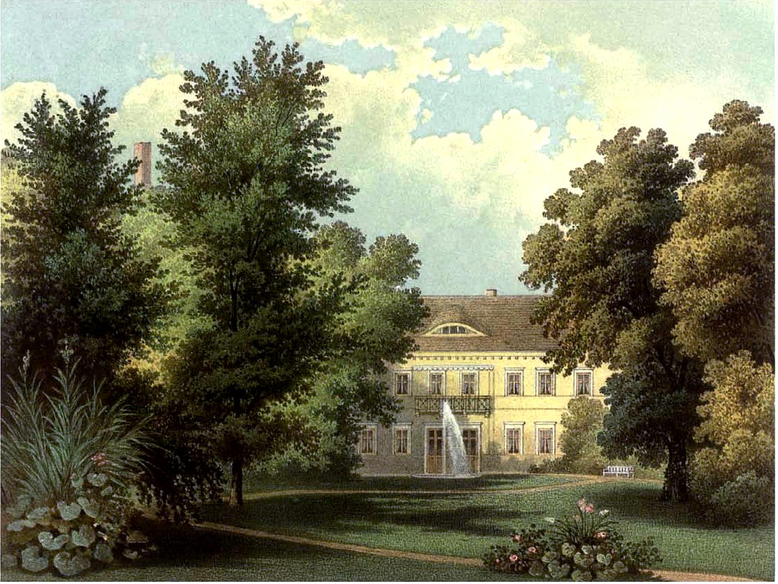 Schloss Kartzow, Kreis Ost-Havelland, Provinz Brandenburg